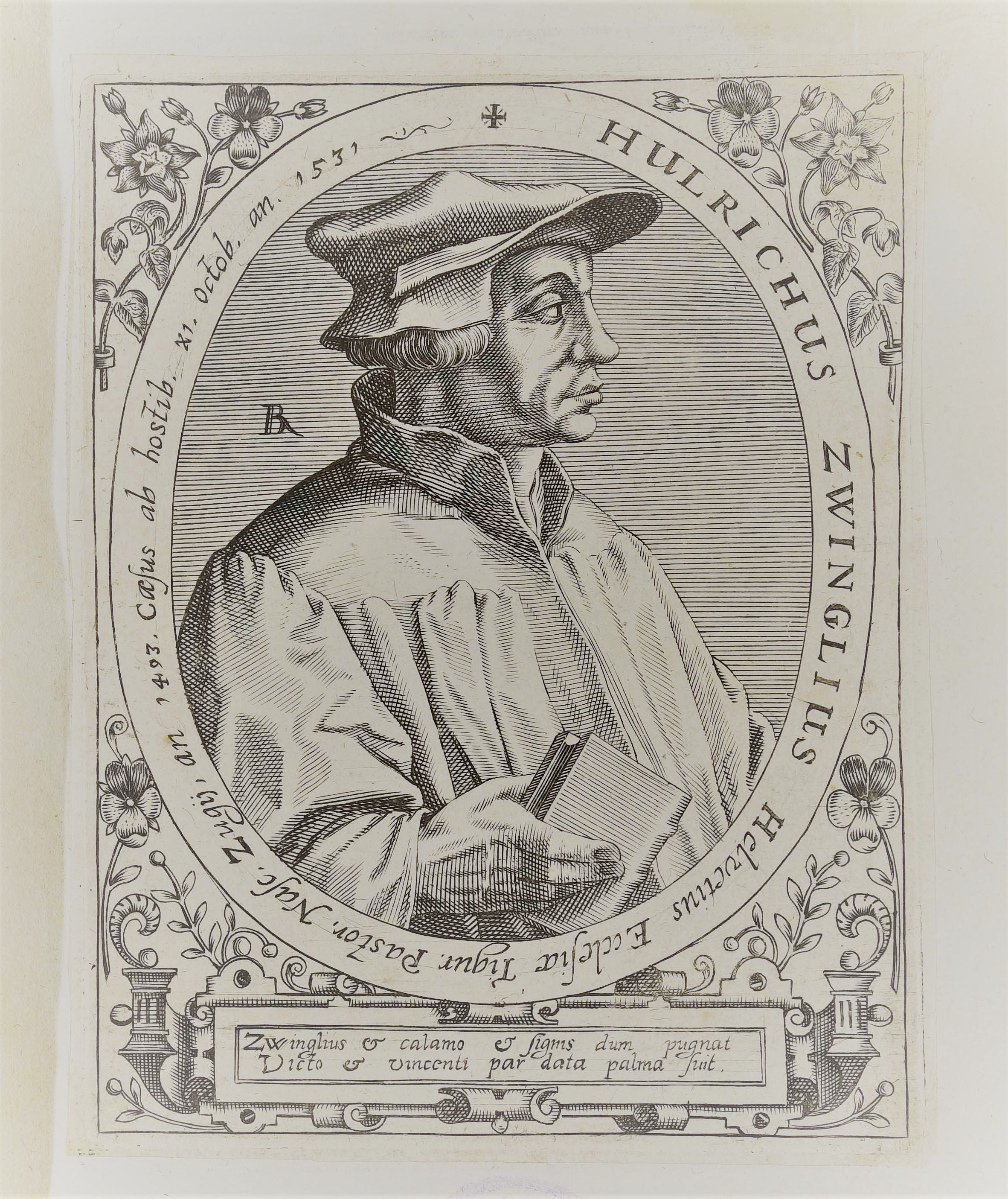 Calcografia in Jean Jacques Boissard, Bibliotheca sive Thesaurus virtutis, Frankfurt am Mein: William Fitzer 1627. Esemplare GI 1 v. c 41 della Biblioteca comunale di Trento, che presenta aggiunte successive.